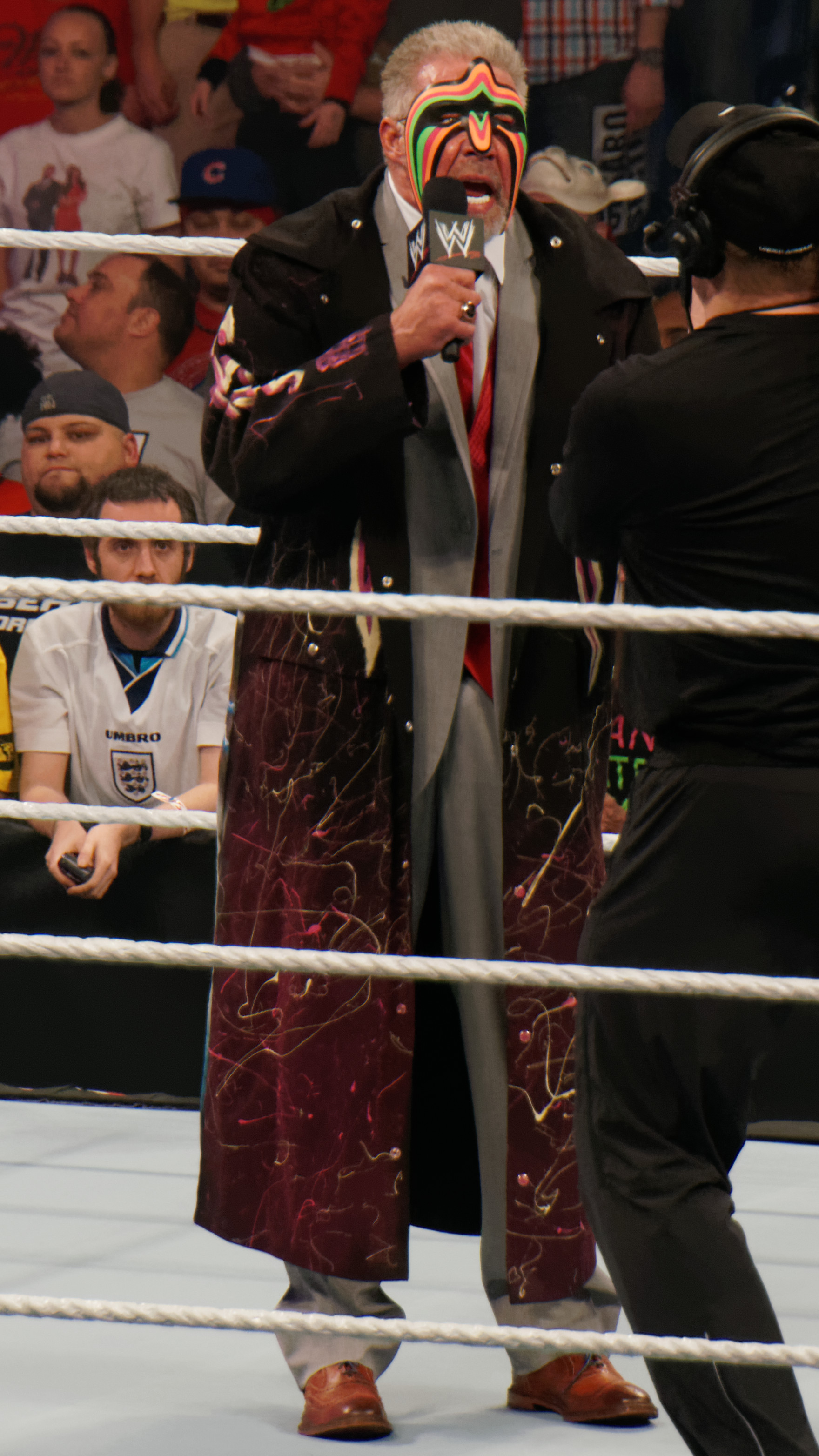 2014-04-07_21-04-32_NEX-6_1507_DxO